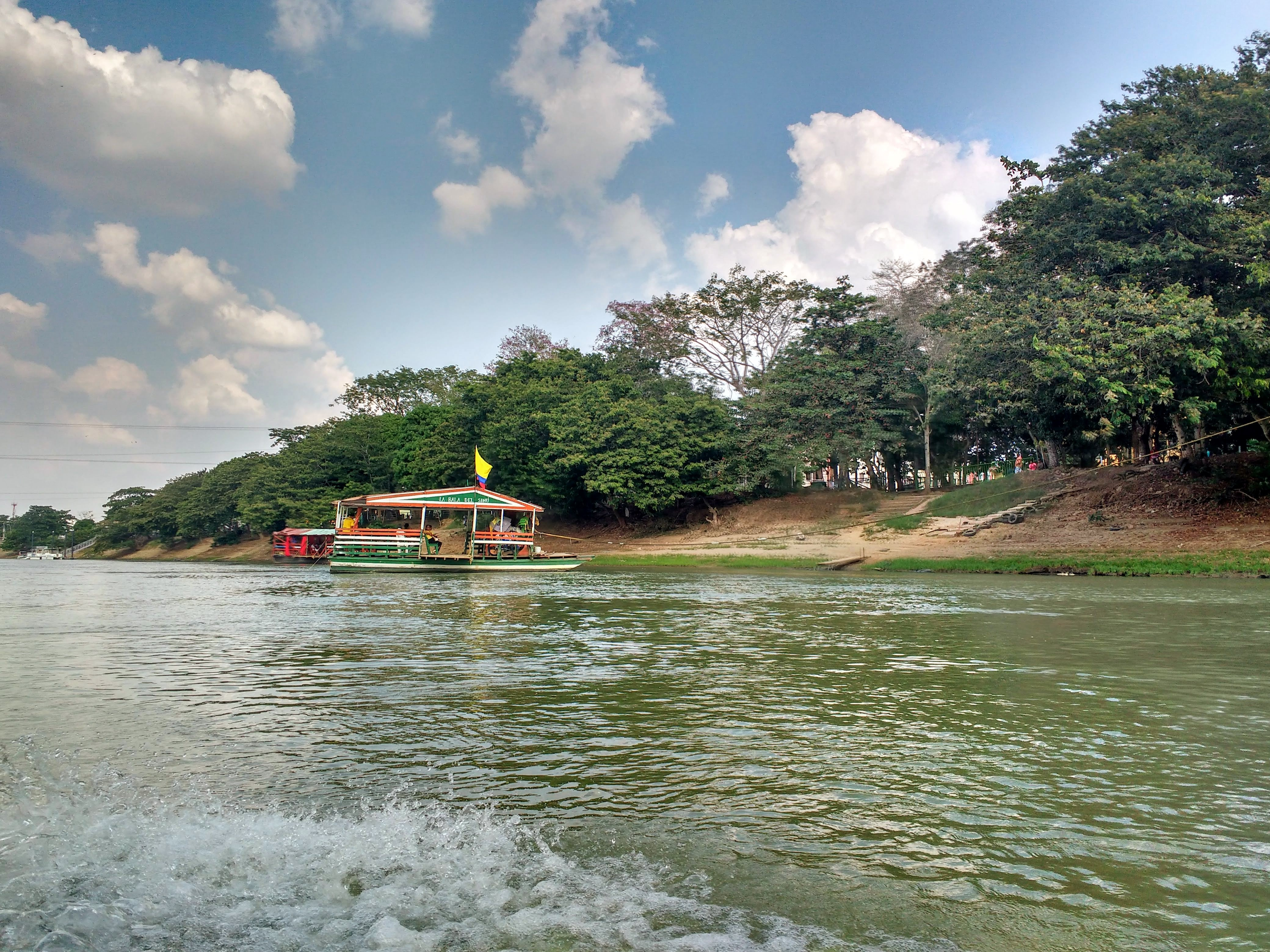 Planchones atravesando el río Sinú a su paso por la ciudad.